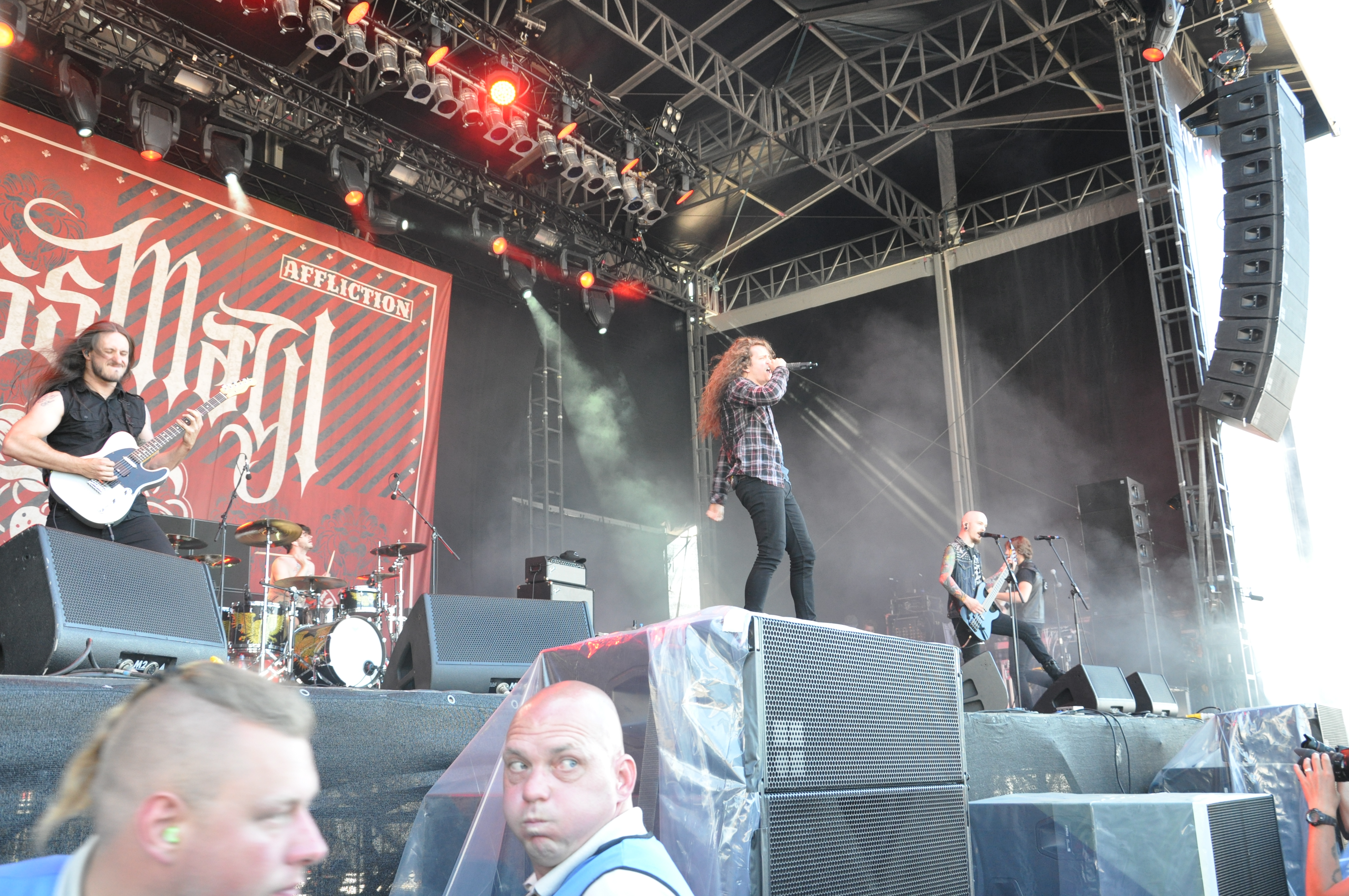 Miss May I auf der Clubstage bei Rock am Ring 2014